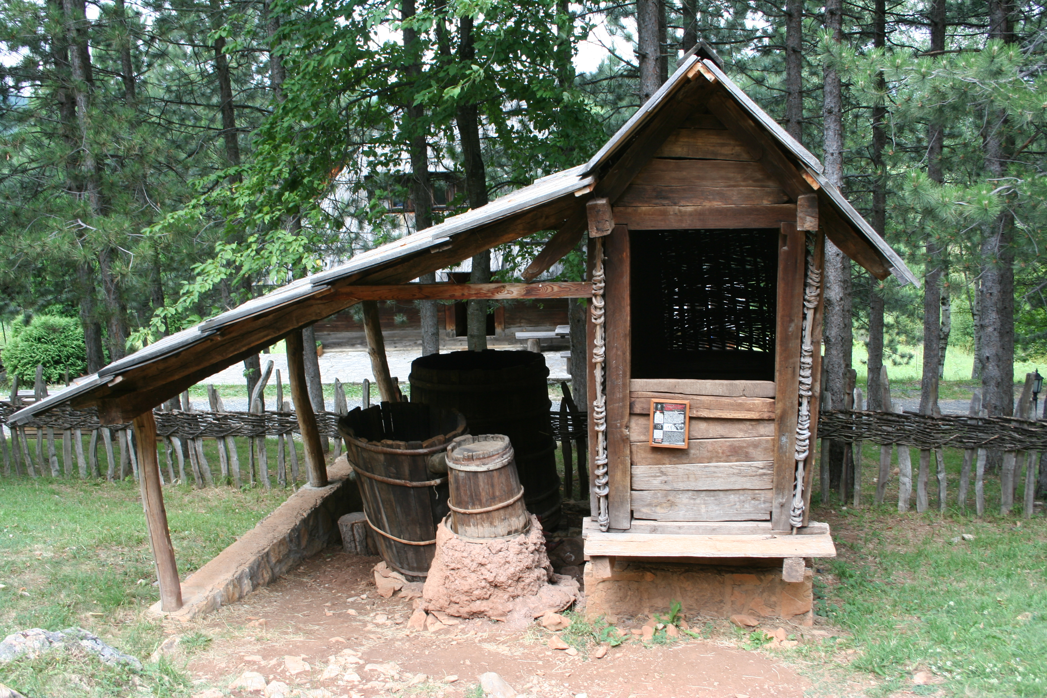 Muzej "Staro selo" Sirogojno